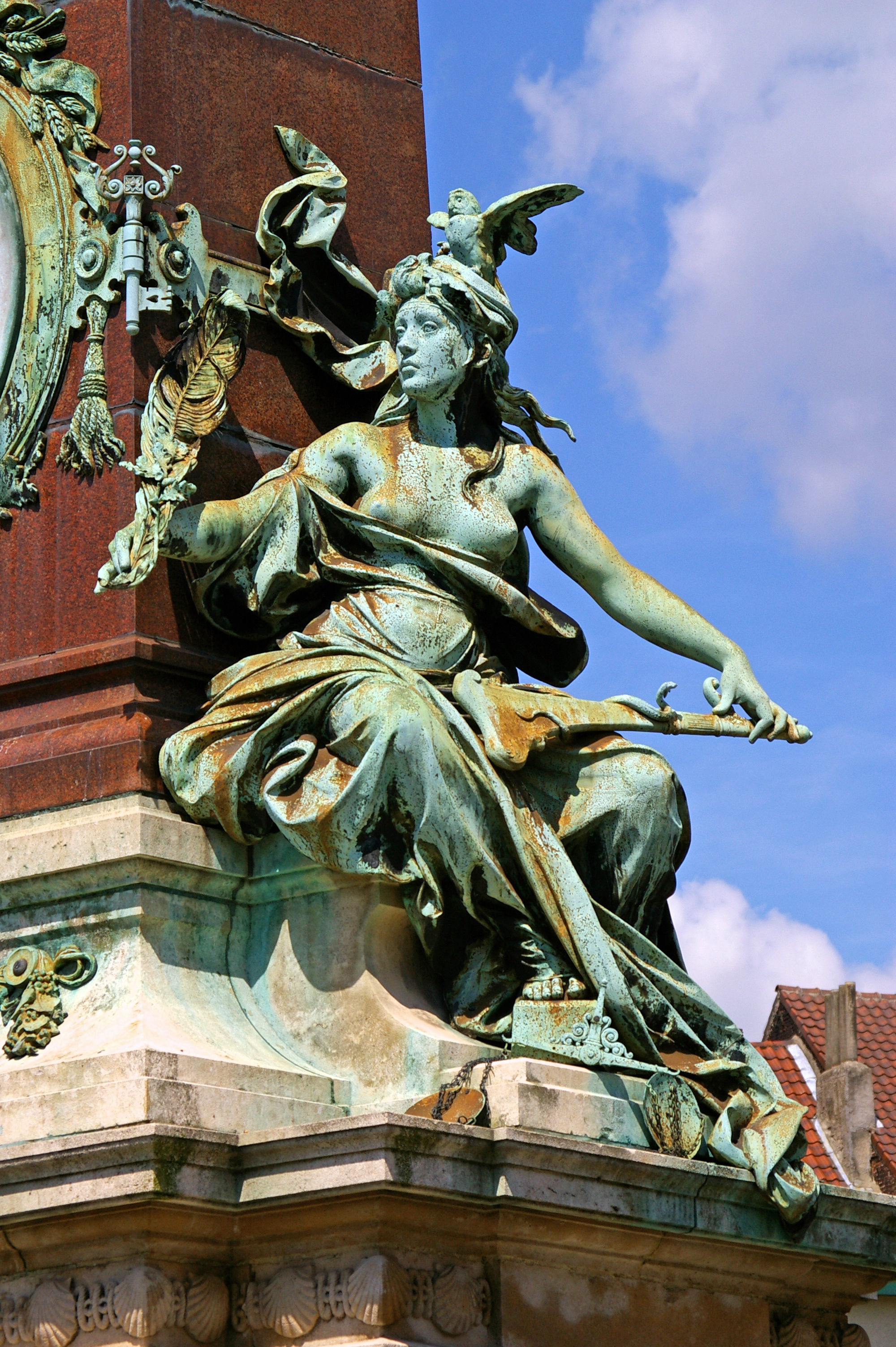 Quartier Maritime - Fontaine Anspach - «magistrature Communale» par Julien Dillens (1849-1904)